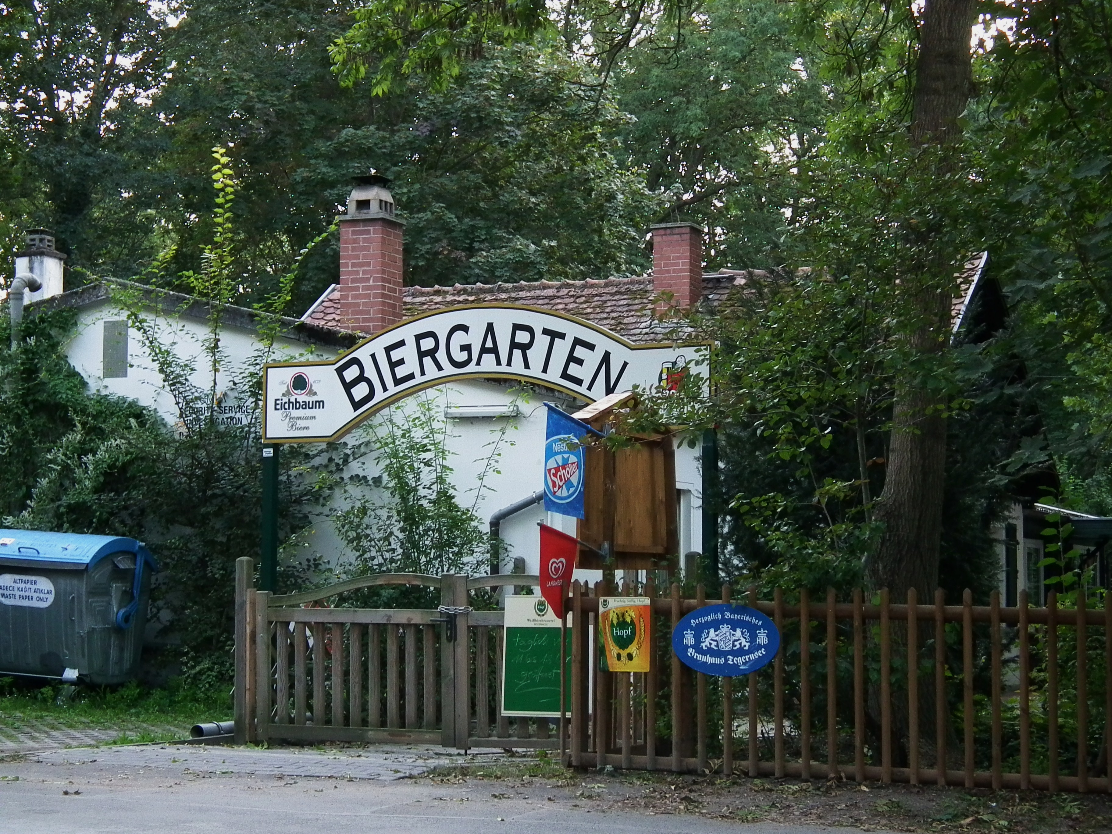 Biergarten in Worms (Rheinland-Pfalz, Deutschland); Ludwigslust 1